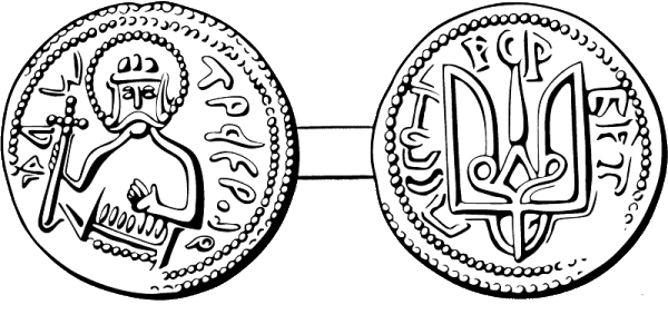 Киевская Русь. Конец X - нач. XI в. Сребреник Владимира Святославича. 980-1015 гг. Лицевая (кн. Владимир) и оборотная (трезубец) стороны. Прорись по А. Г. Силаеву.